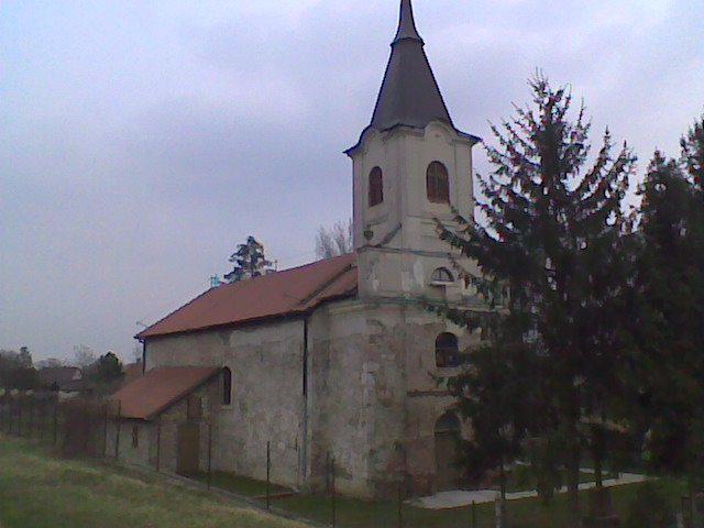 A tiszasülyi Szent László-templom